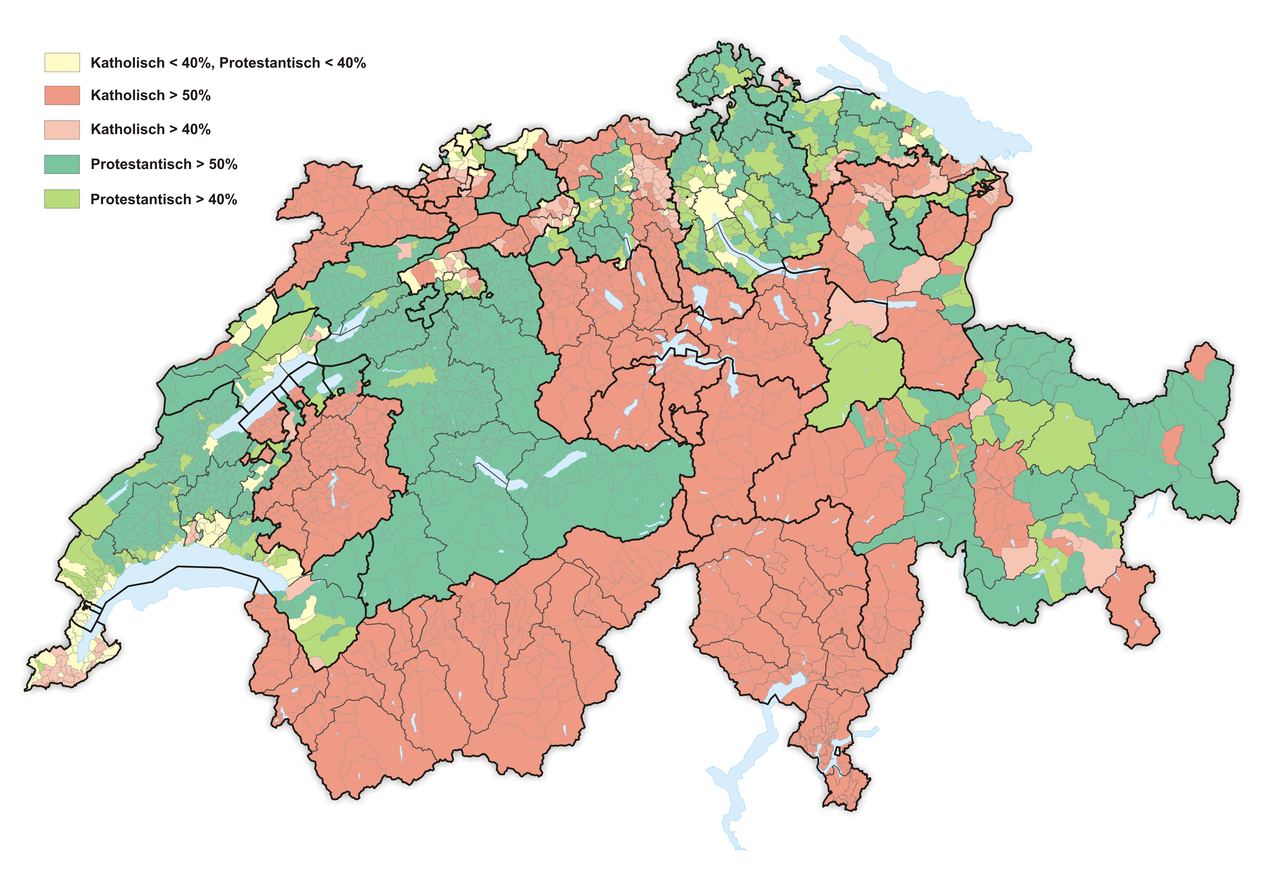 Religion in Switzerland